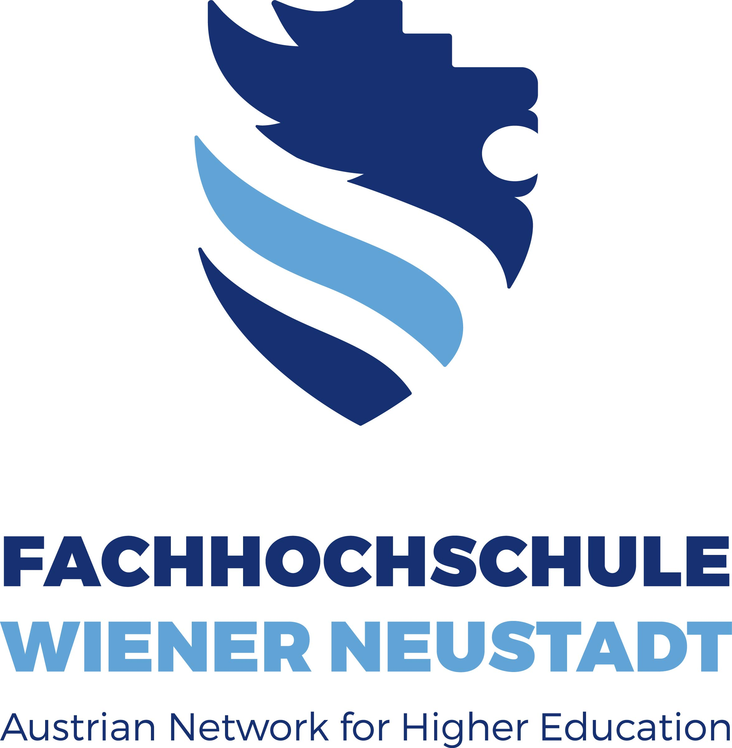 Logo FH Wiener Neustadt